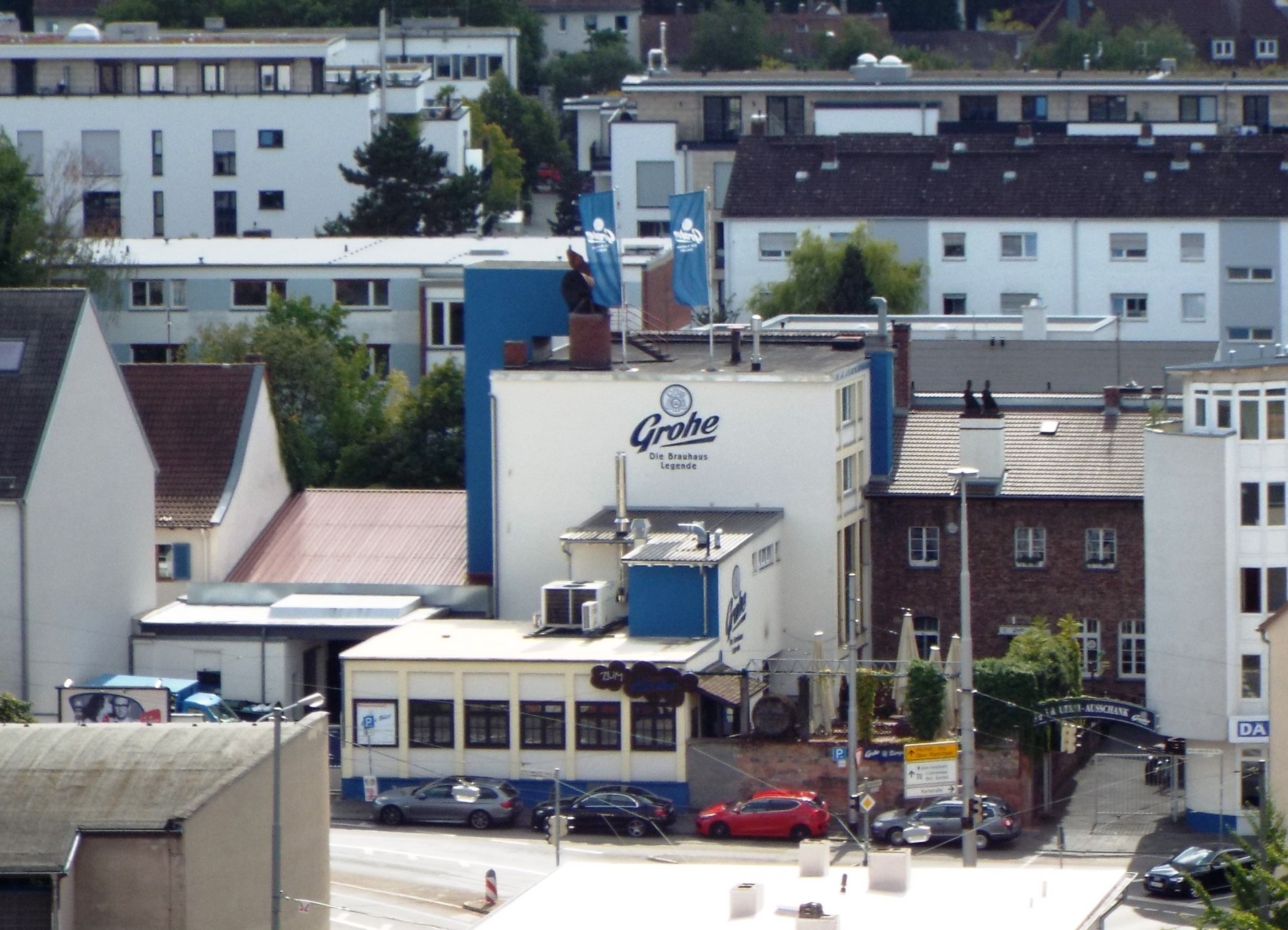 64283 Darmstadt, Nieder-Ramstädter Straße 3, Grohe Brauhaus